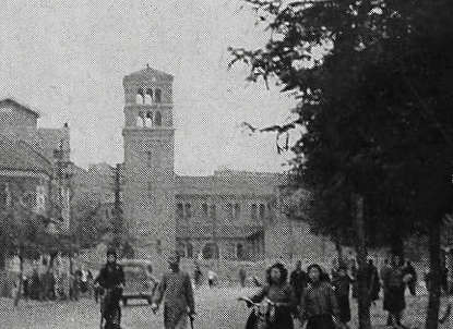 青岛圣保罗教堂历史照片